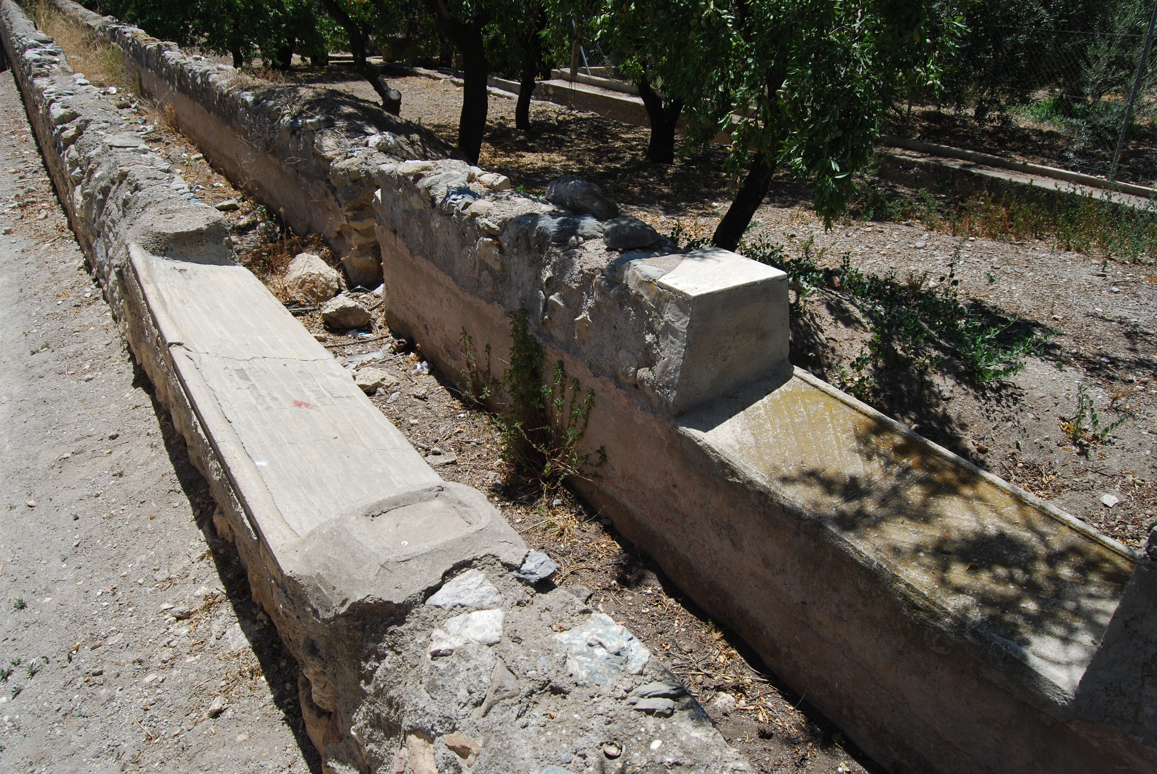 Vista de un tramo de la acequia de los molinos